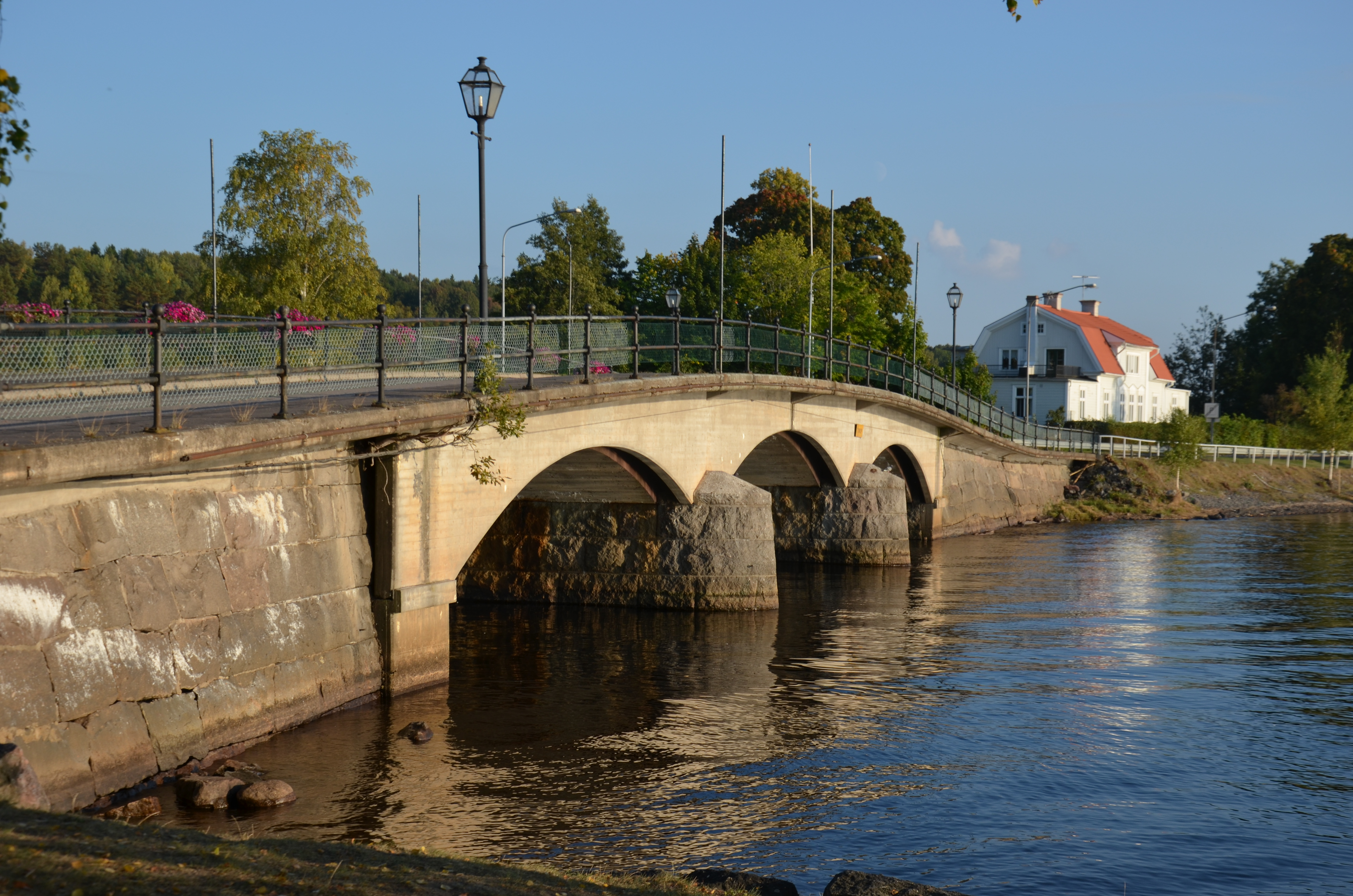 Gamla Sundbron i Lindesberg